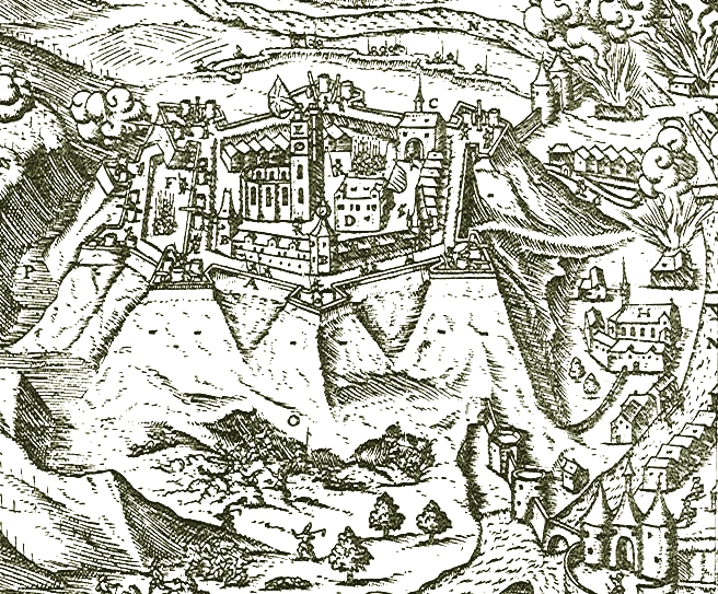 Eger vára 1596